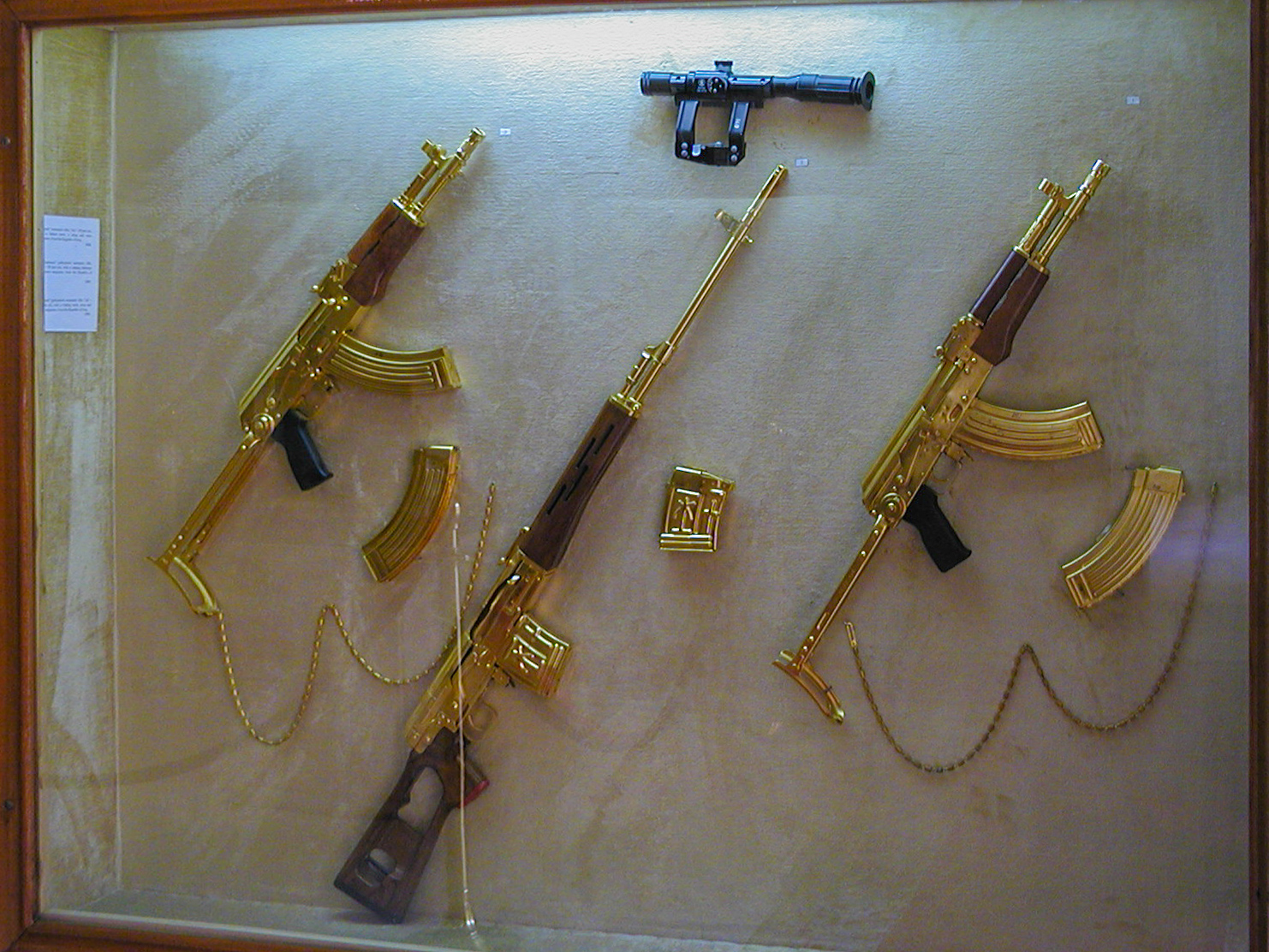 fr: Kalachnikov en or massif au Musée du Palais d'Abedin, Le Caire, Égypte.